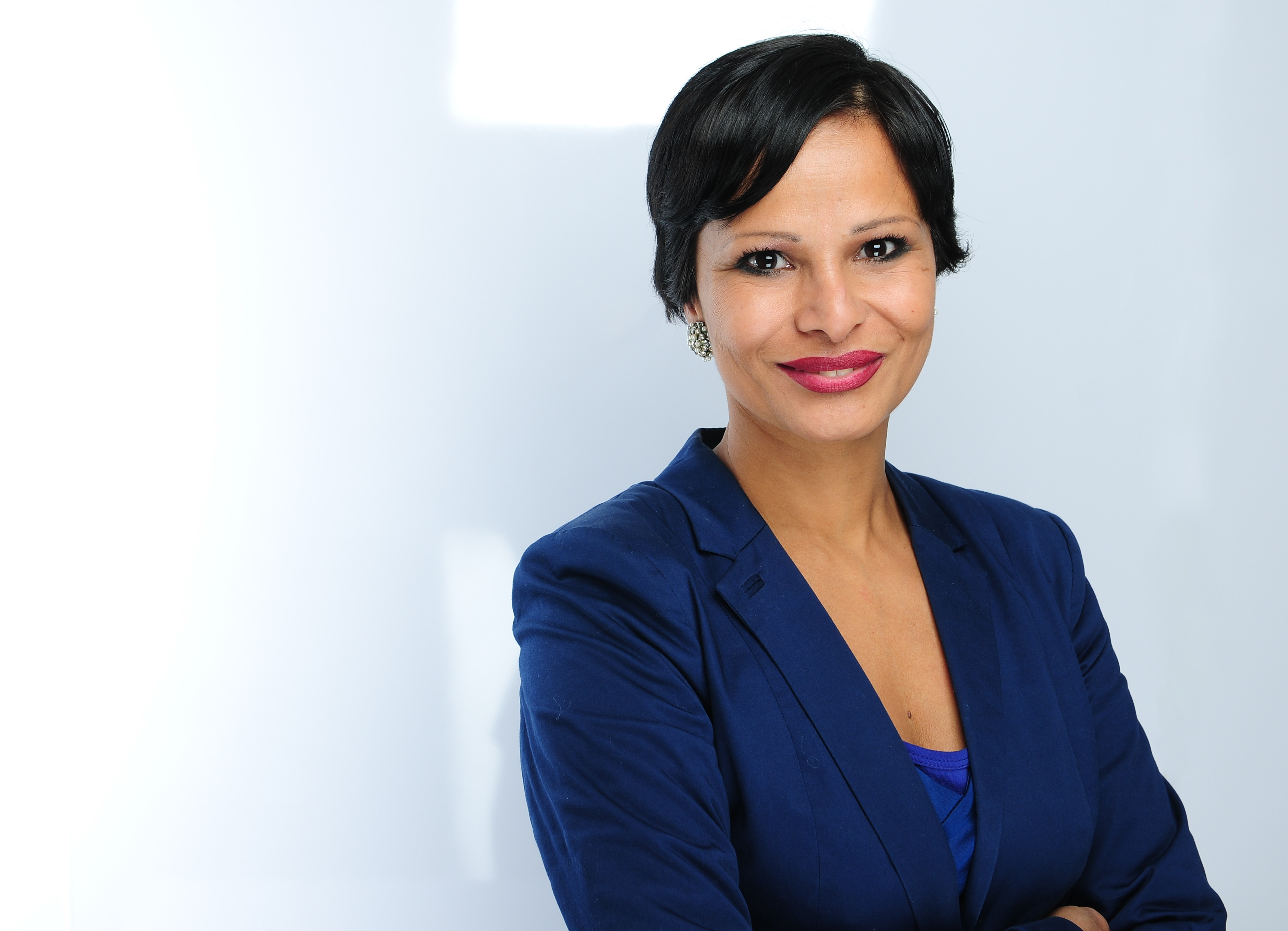 Buchautorin und Ayurveda-Expertin Balvinder Sidhu